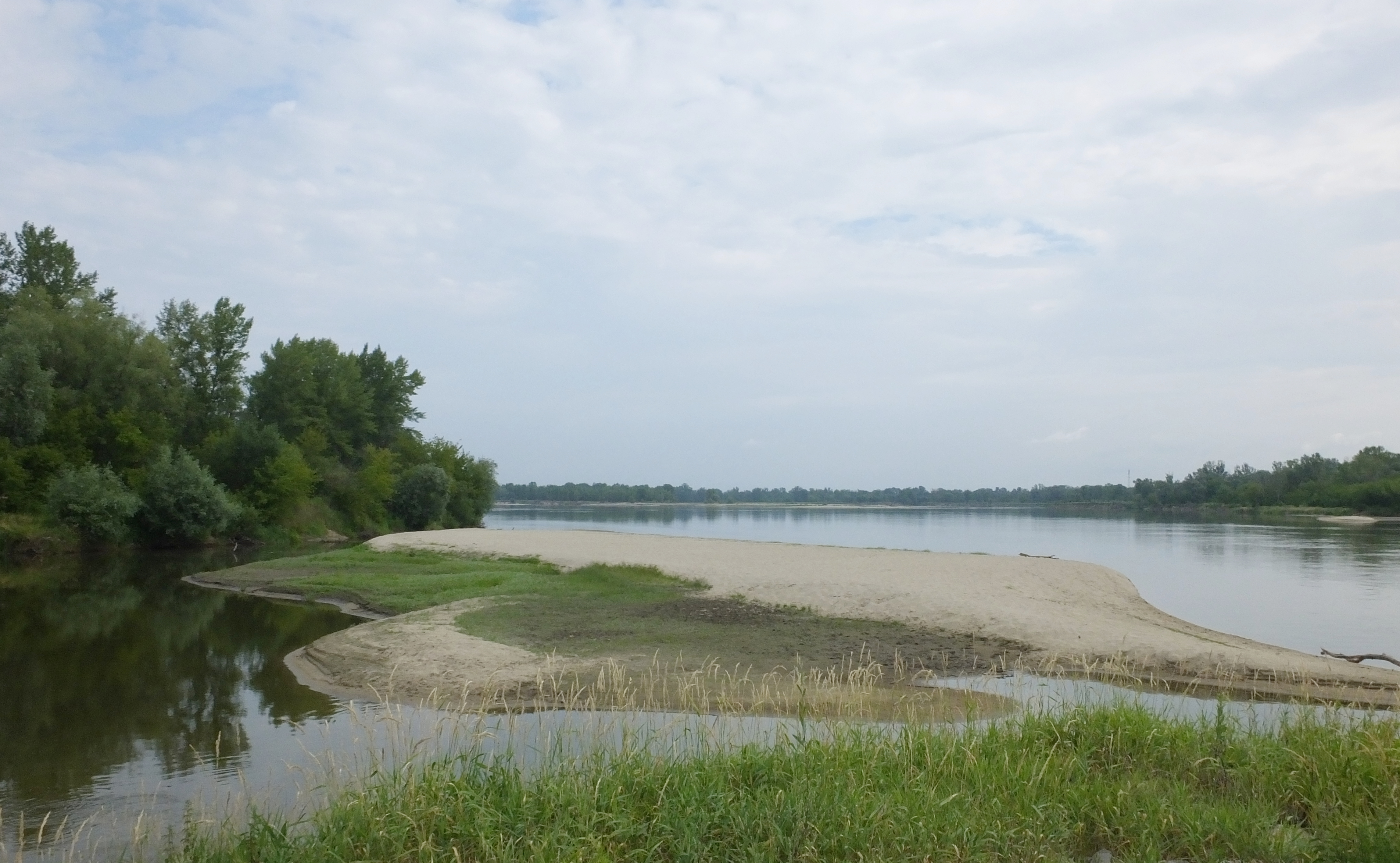 Rezerwat Wyspy Świderskie w Gassach-Kopytach This is a photography of protected area with CRFOP ID PL.ZIPOP.1393.RP.720